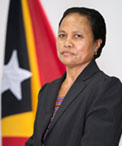 Helena Martins Belo, Abgeordnete des Nationalparlaments Osttimors